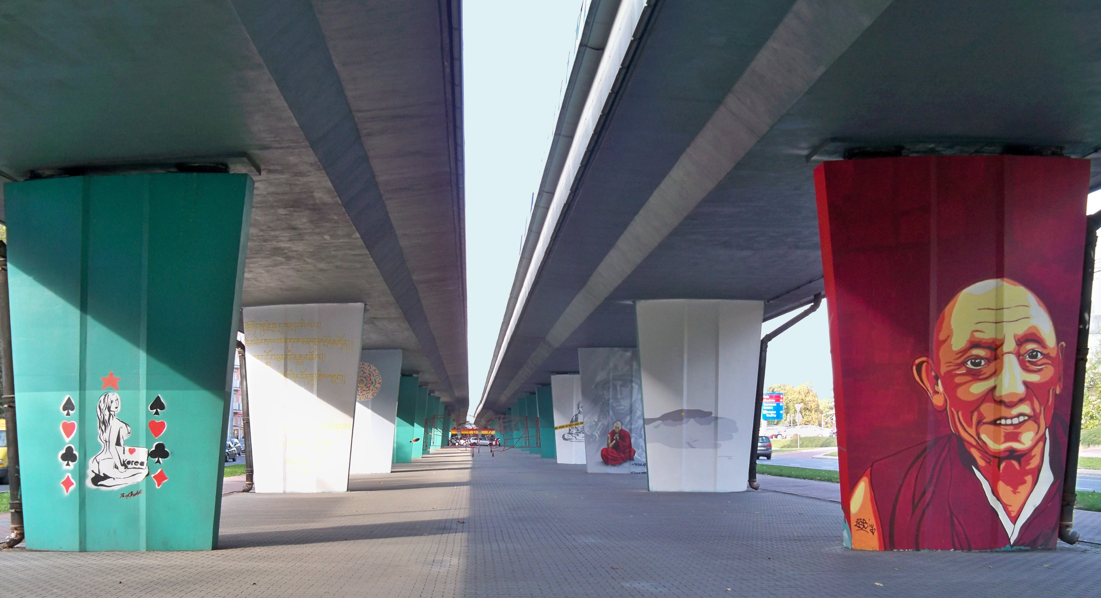 Galeria Tybetańska. Zespół murali wzdłuż al. Prymasa Tysiąclecia w Warszawie. Większość na filarach estakady nad rondem Tybetu. Pierwsz po prawej: Tuse "Palden Gjaco". Drugi po prawej: Agata Bogacka "Droga do wolności"